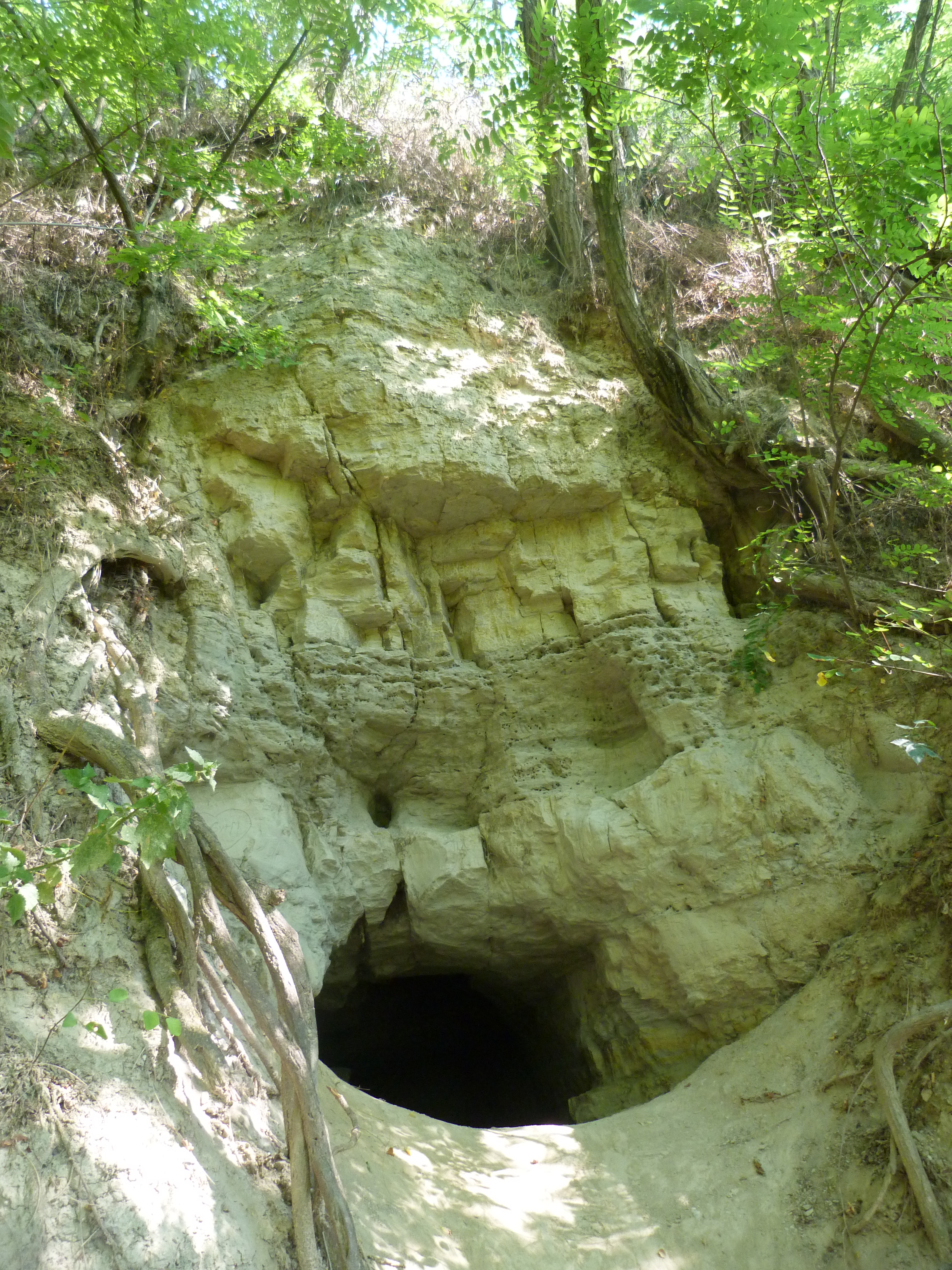 A felvétel 2015. augusztus 4-én kedden készült Balatonkenesén. Balatonfő, Tatár lik. A Tatát likak a kerékpáros Kenese Kör útvonaláról közelíthető meg. A balatonkenesei Magas Part oldalába vájt Tatár likakban a helyiek húzták meg magukat ellenséges betörés idején. A tatárok, törökök elől menekülve találtak itt menedéket. Később ezek a pannon üledékbe vájt lyukak a legszegényebbek lakásai lettek. A Magas Part a legújabb korban jelentős változásokon ment át. A Balaton 1861-ben történt lecsapolása után a Balaton vize 200-300 méterrel visszahúzódott. Ezzel a meredek partoldalban levő Tatár likak szinte megközelíthetetlenné váltak. Összesen 9 barlangot rejt a partoldal, melyek 5 szinten helyezkednek el. A barlangokat Jankó János és Soós Lajos költő kutatták. A Magas Part anyaga a közhiedelemmel ellentétben nem lösz, hanem Pannon tengeri üledék, amely cca 10 millió évvel ezelőtt rakódott le a sekély tengerből. A meredek fal létrejöttét a Balaton hullámverése okozta, mely alámosta a laza üledékből álló partot.